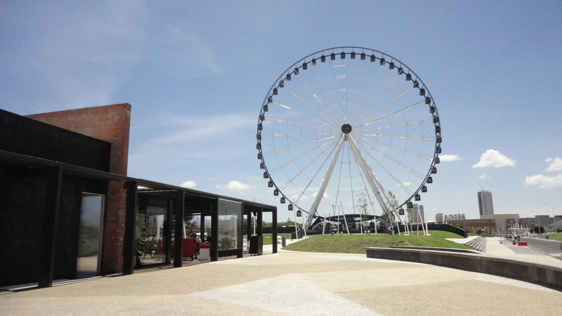 Cafetería que es un punto de encuentro